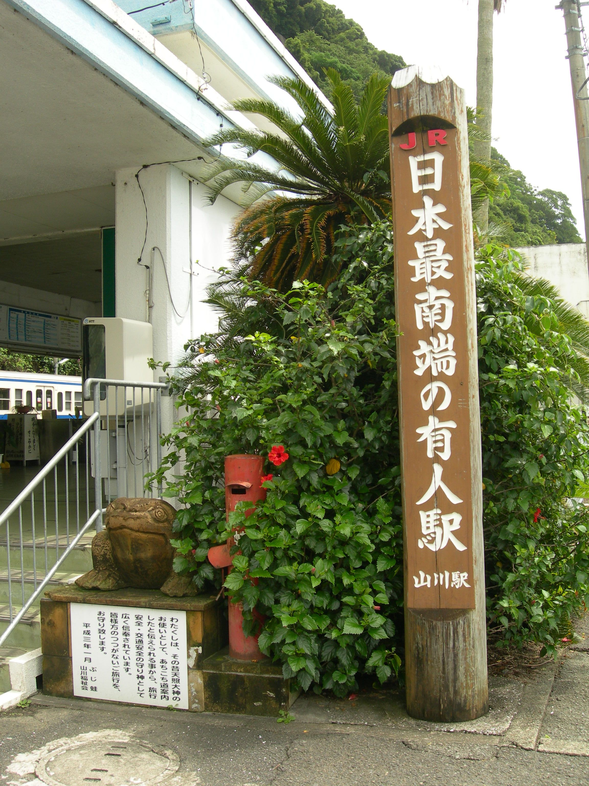 山川駅（やまかわえき）『JR日本最南端の有人駅』記念標